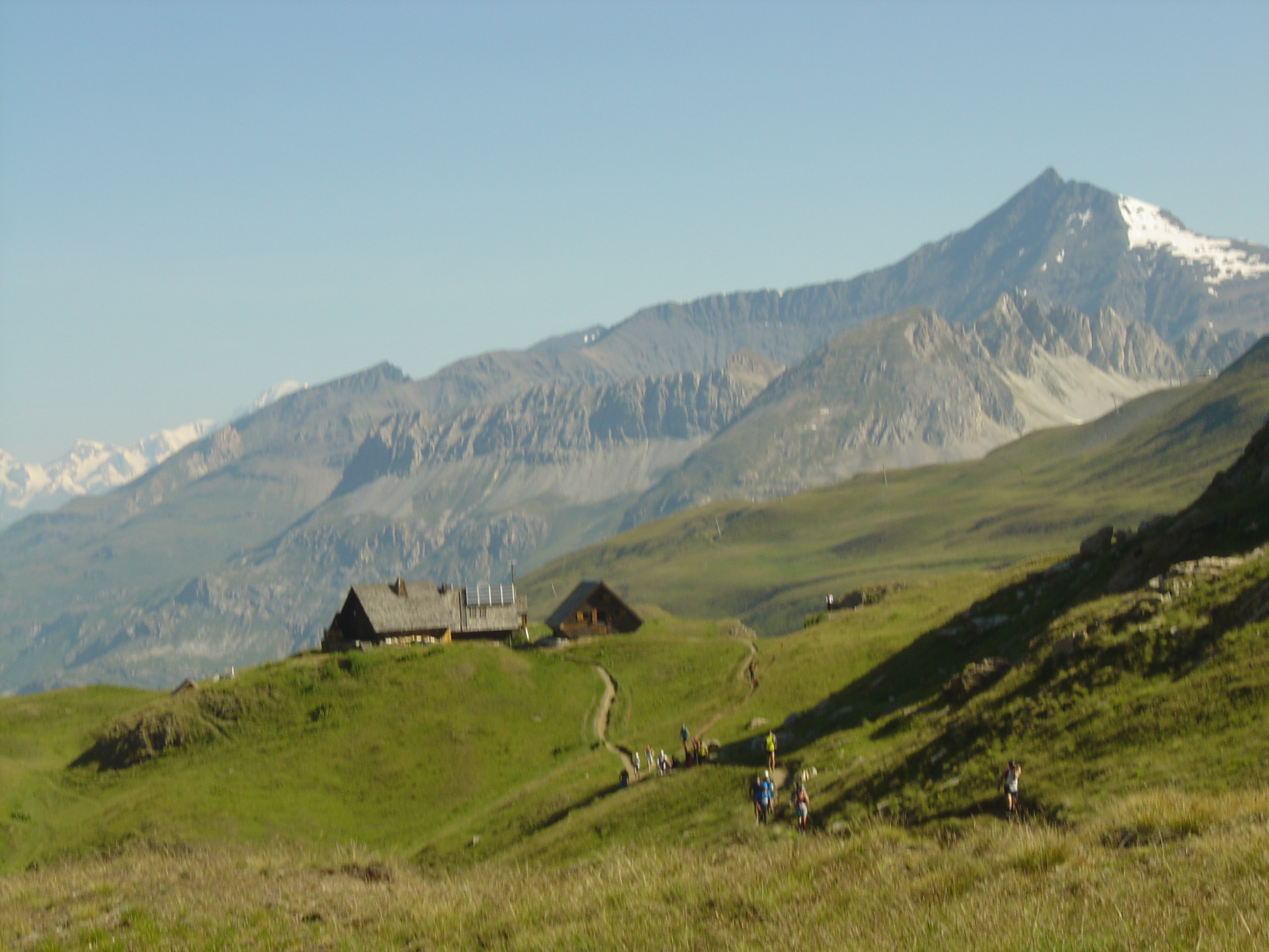 Refuge du Fond des Fours (2537m) dans la montée du col des Fours à partir de Val d'Isère. Passage des coureurs de l'Altispeed (moyen parcours de l'Ice Trail Tarentaise)